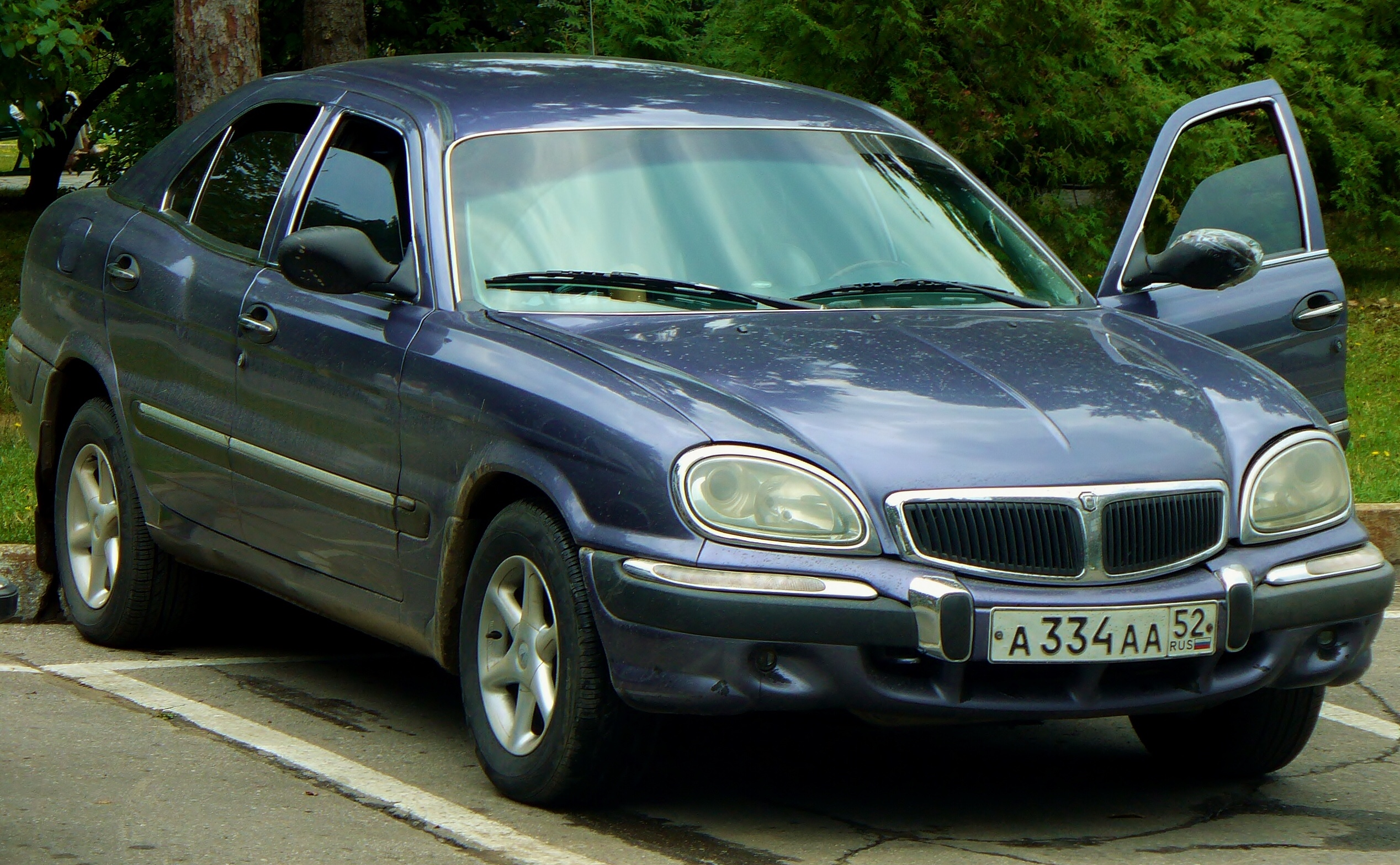 ГАЗ-3111 Волга